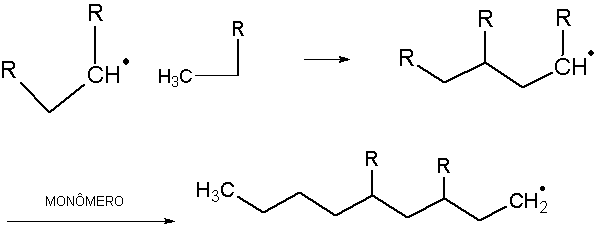 polimerização radicalar